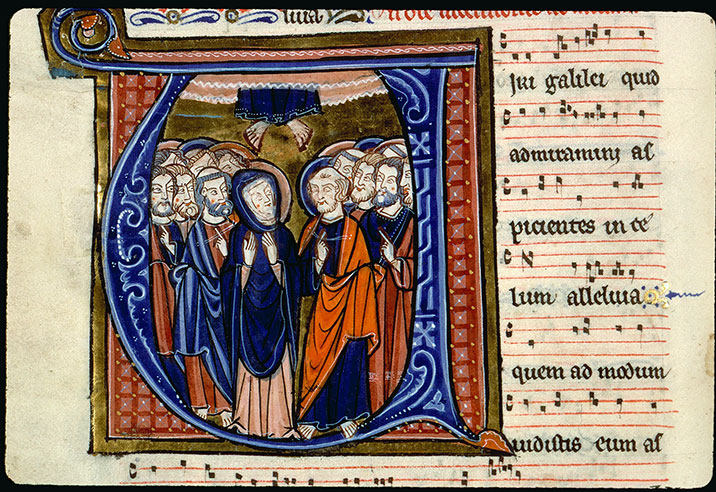 Lettre historiée A - Ascension